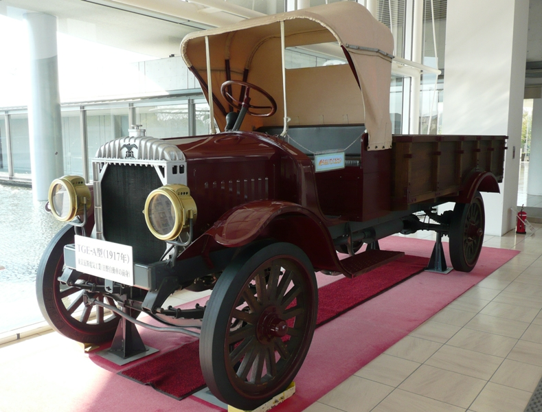 Hino TGE-A.